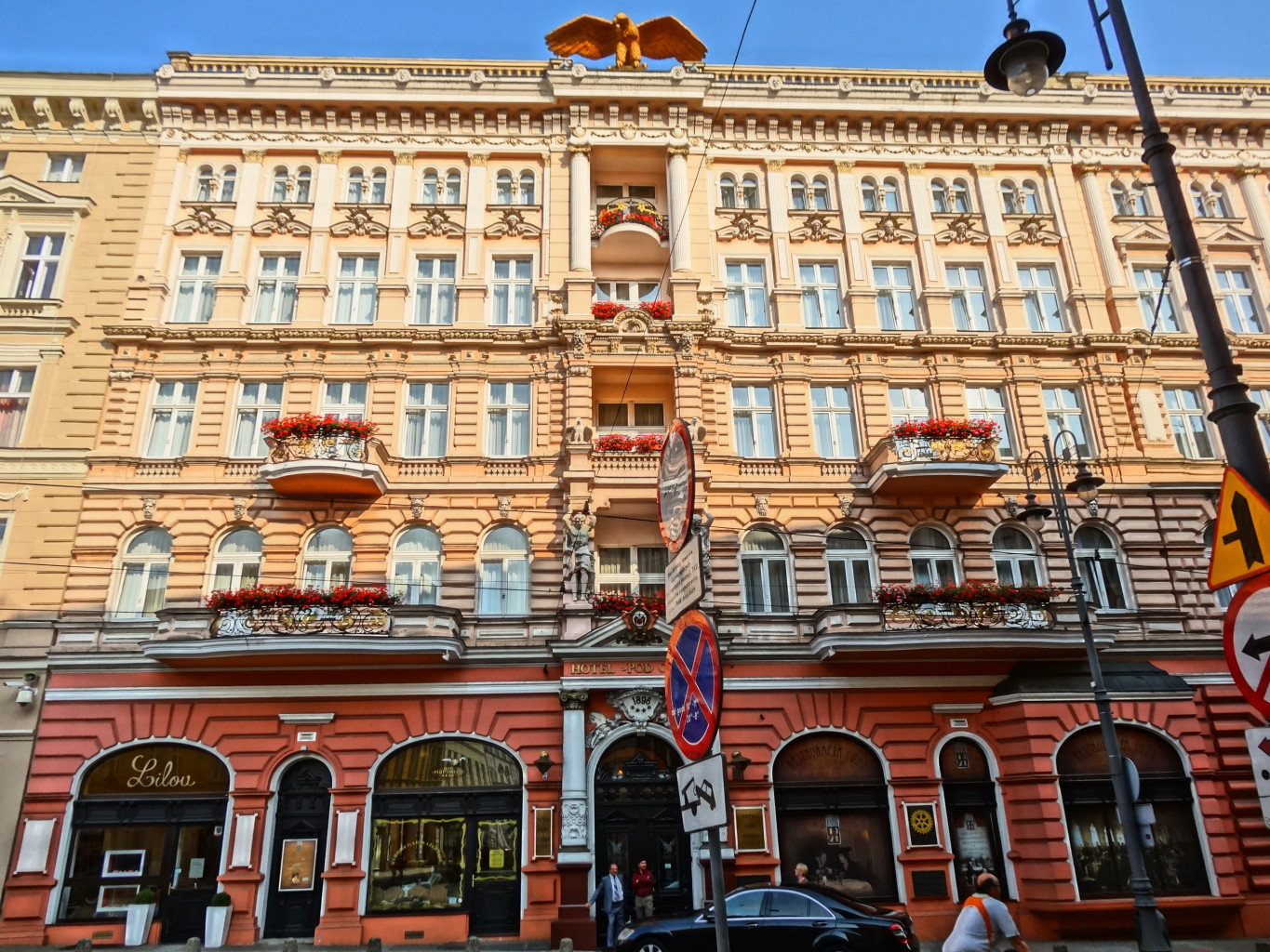 Hotel Pod Orłem w Bydgoszczy przy ul. Gdańskiej 14 (zbud. 1896, Józef Święcicki)